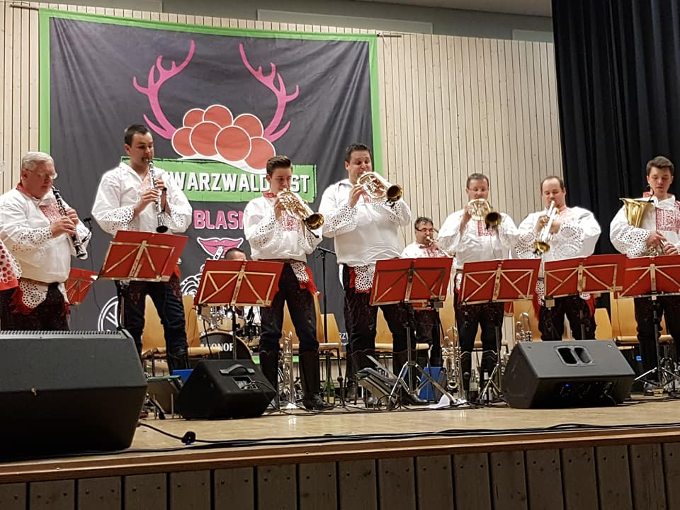 Mistrinanka am 28.4.2018 beim Schwarzwaldfest der Blasmusik